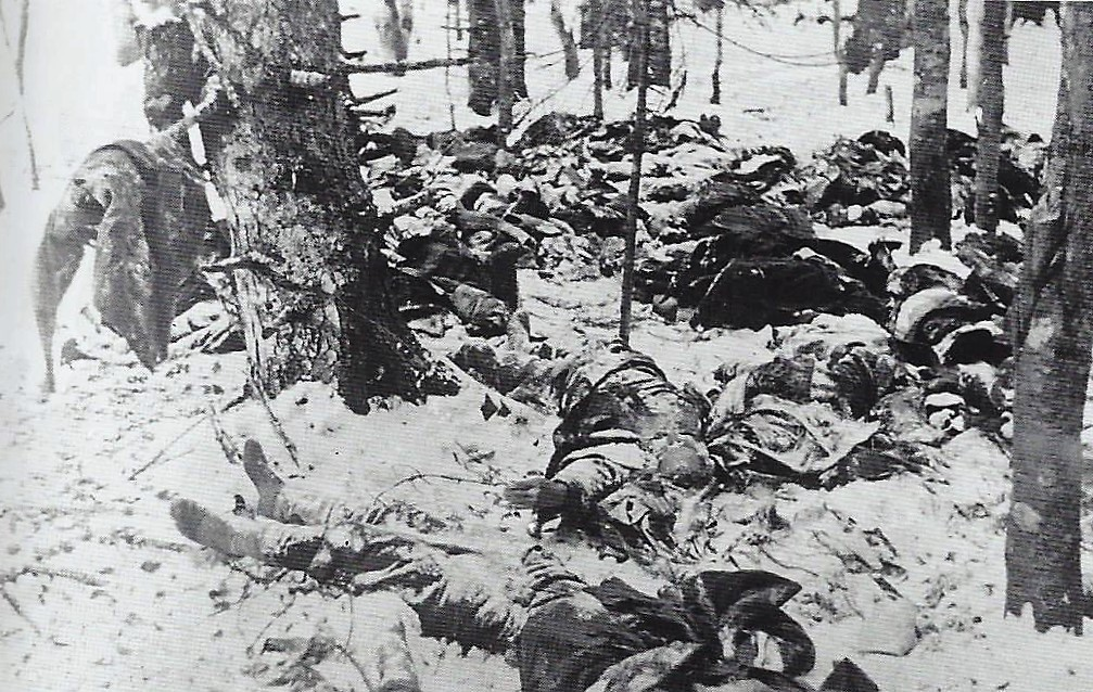 Padli borci pohorskega bataljona